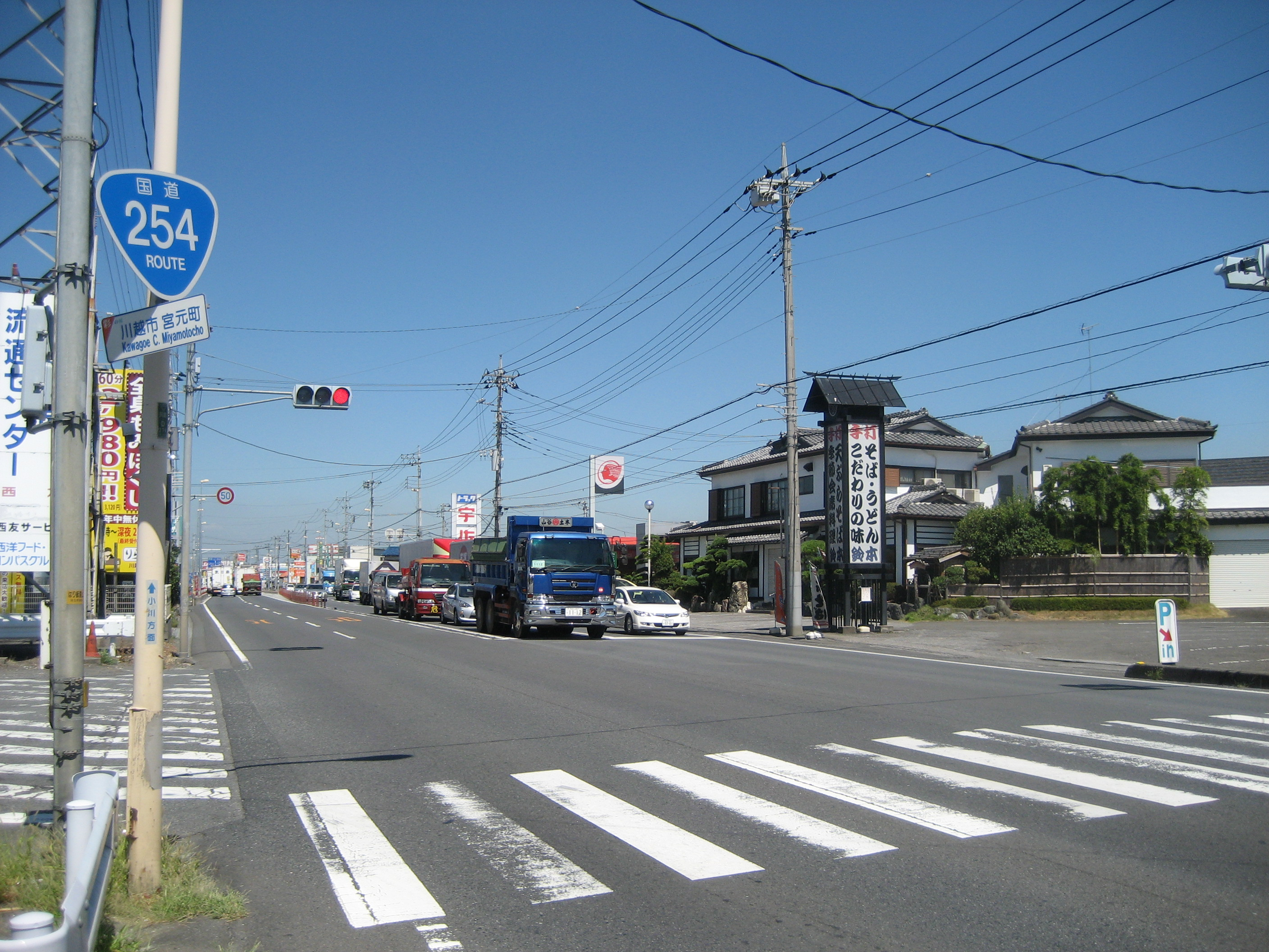 国道254号線埼玉県川越市宮元町付近